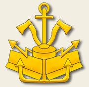 Петличный знак инженерных войск